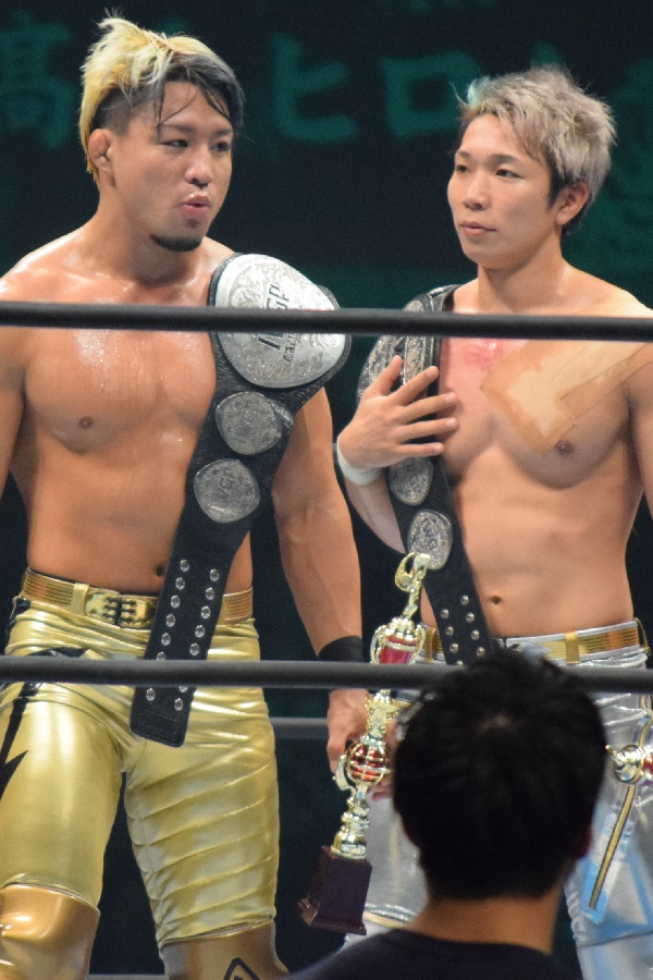 2017年11月5日 大阪府立体育会館「POWER STRUGGLE」 ロッポンギ3K（SHO & YOH）